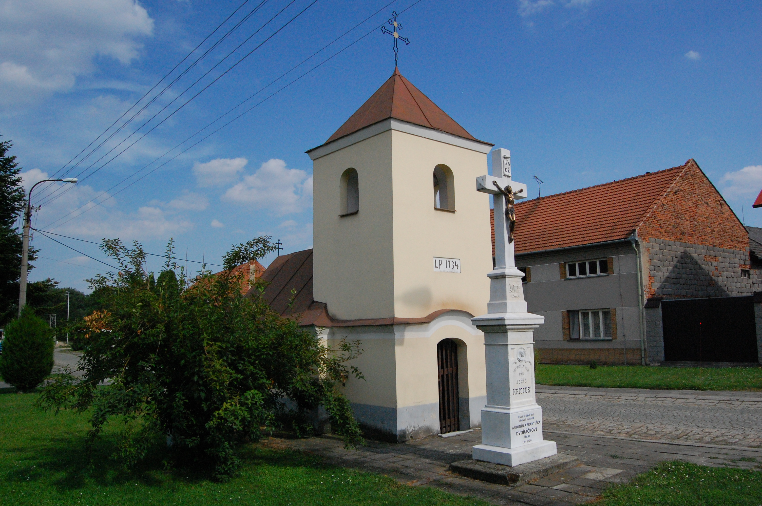 Kaple svatého Jana Nepomuckého, Věrovany, okres Olomouc